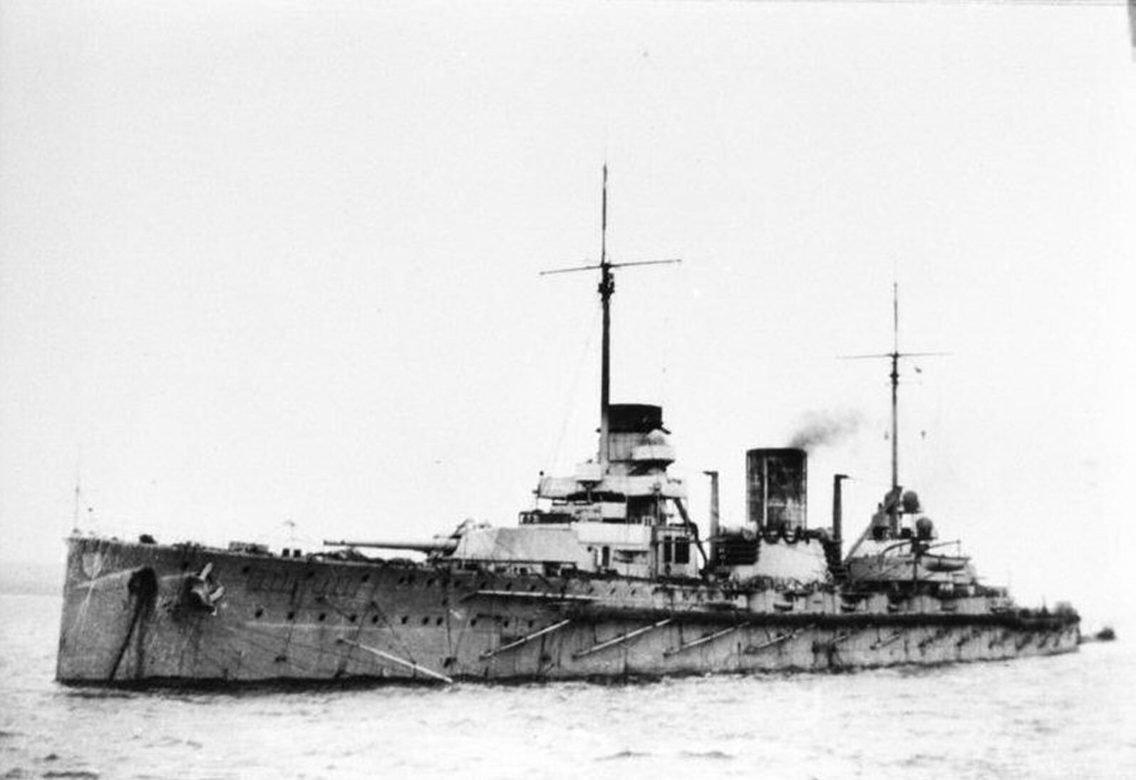 Goeben, Großer Kreuzer Stapellauf: 28.3.1911